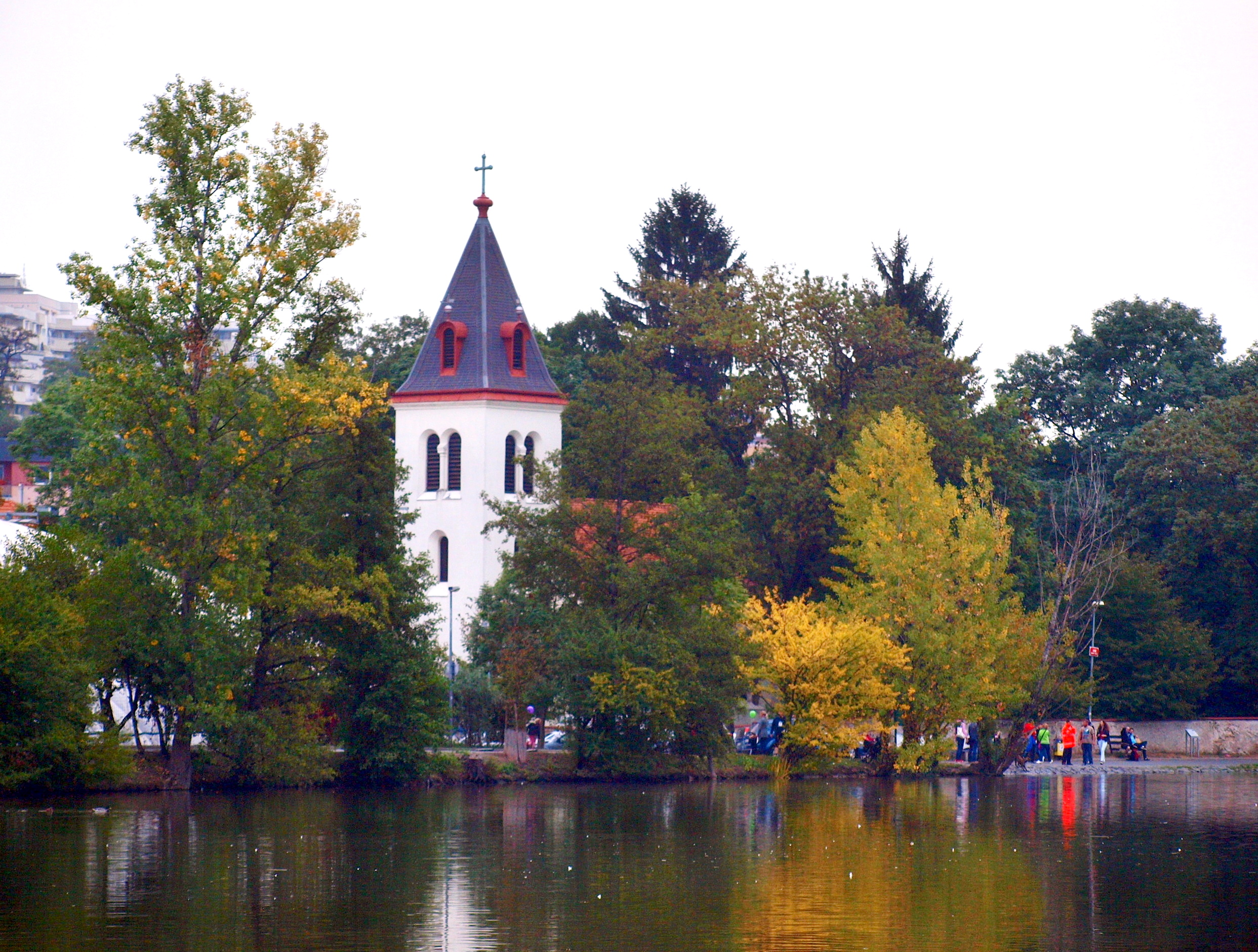 Praha 10-Záběhlice, Hamr a kostel Narození P. Marie